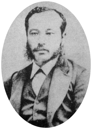 a Japanese man 大鳥圭介 (Keisuke Otori)